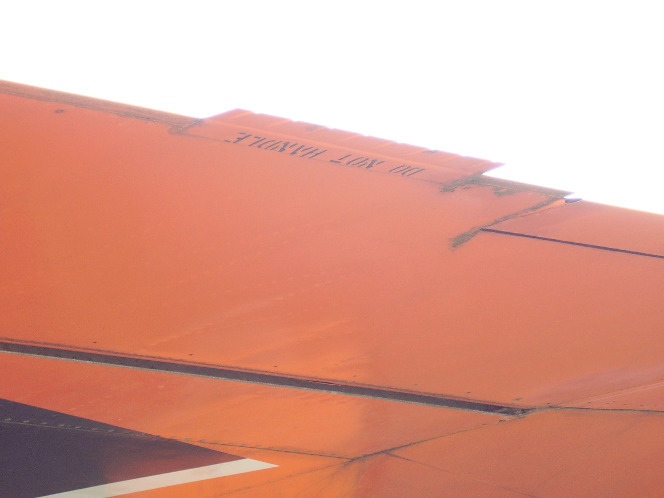 Luftwaffenmuseum der Bundeswehr; Airforce Museum of the Bundeswehr; Berlin-Gatow; "Bügelkante"